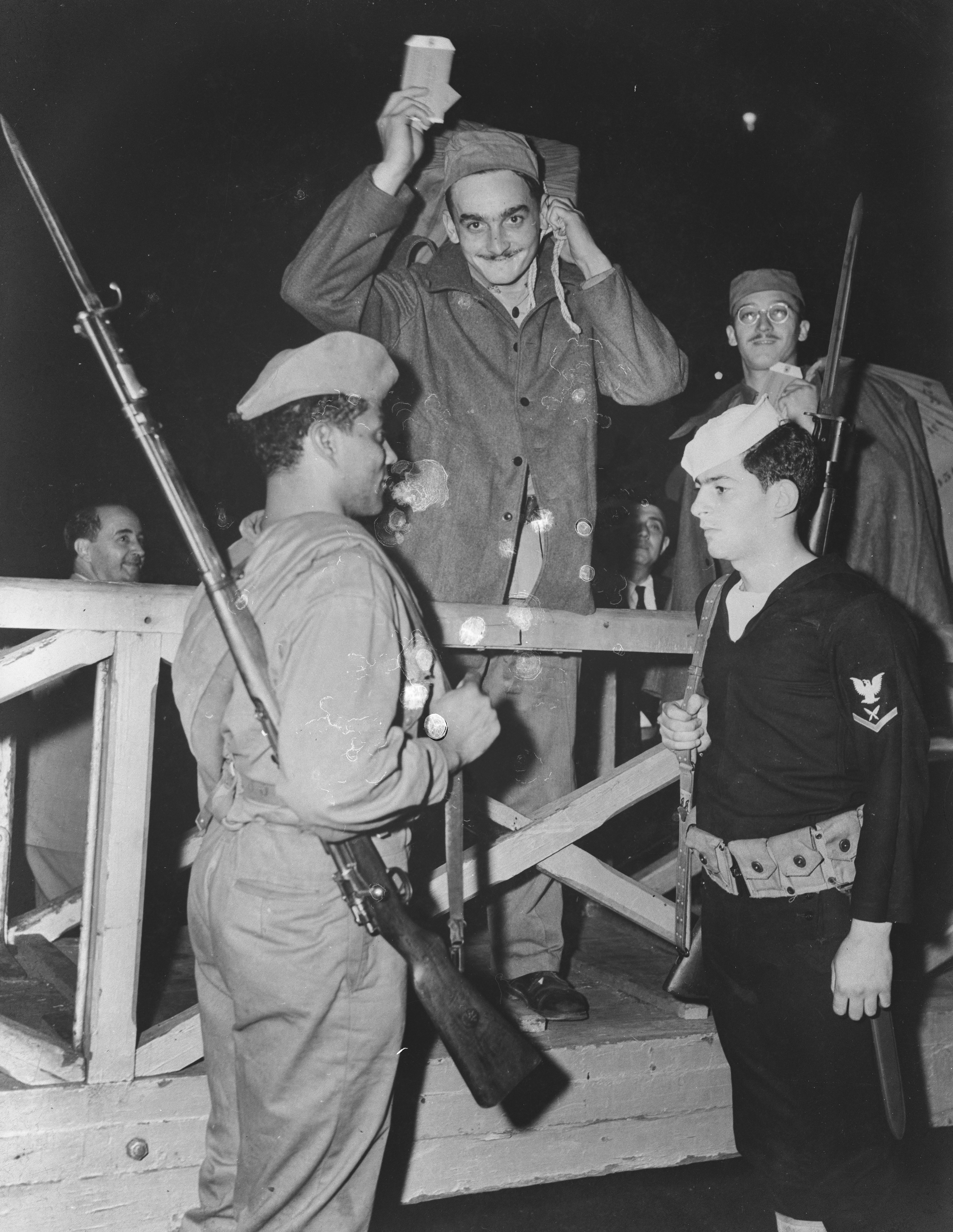 Imagem do Fundo Agência Nacional.